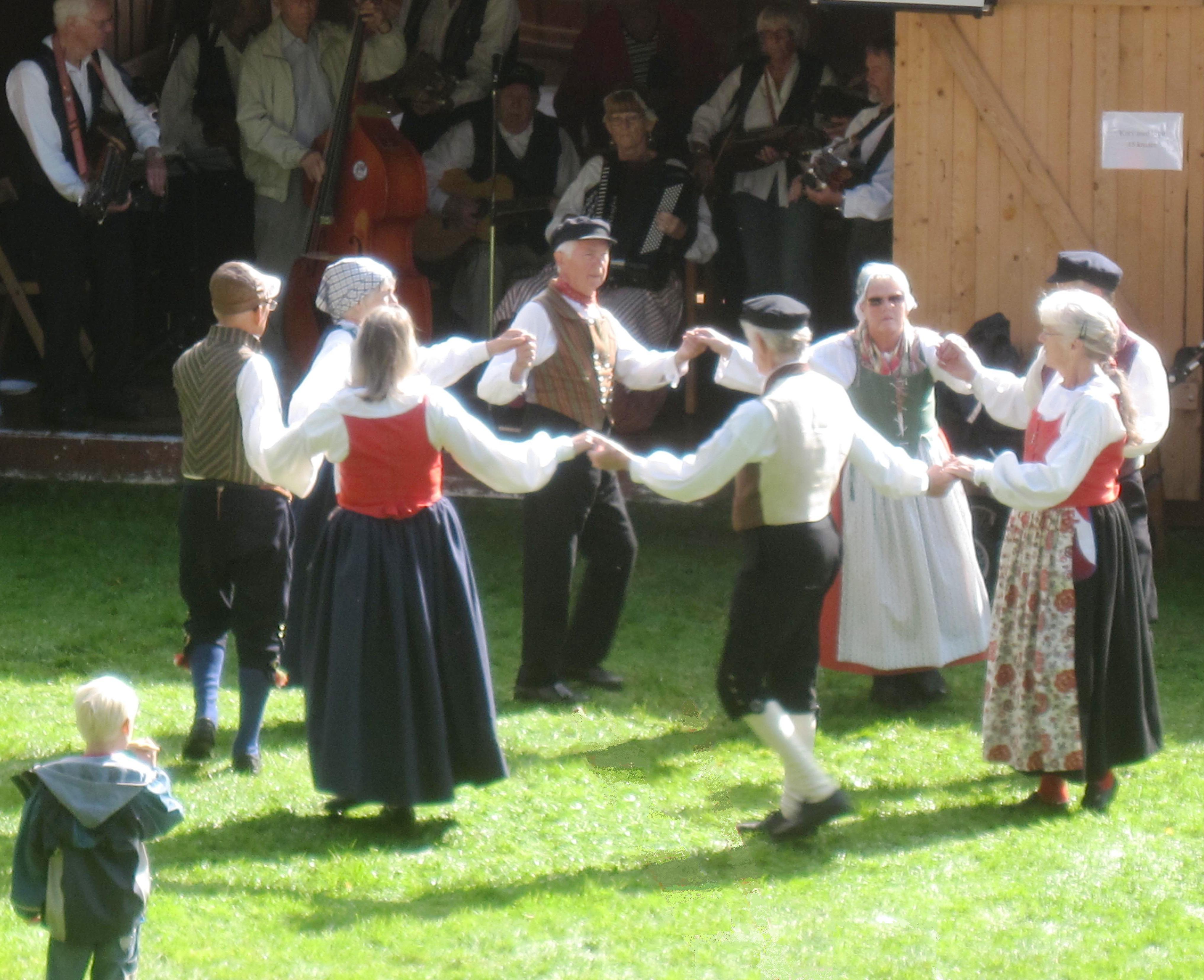 Folkdans på Dalens hembygdsgård i Svartedalen, Bohuslän. Folkdräkter från Bohuslän.